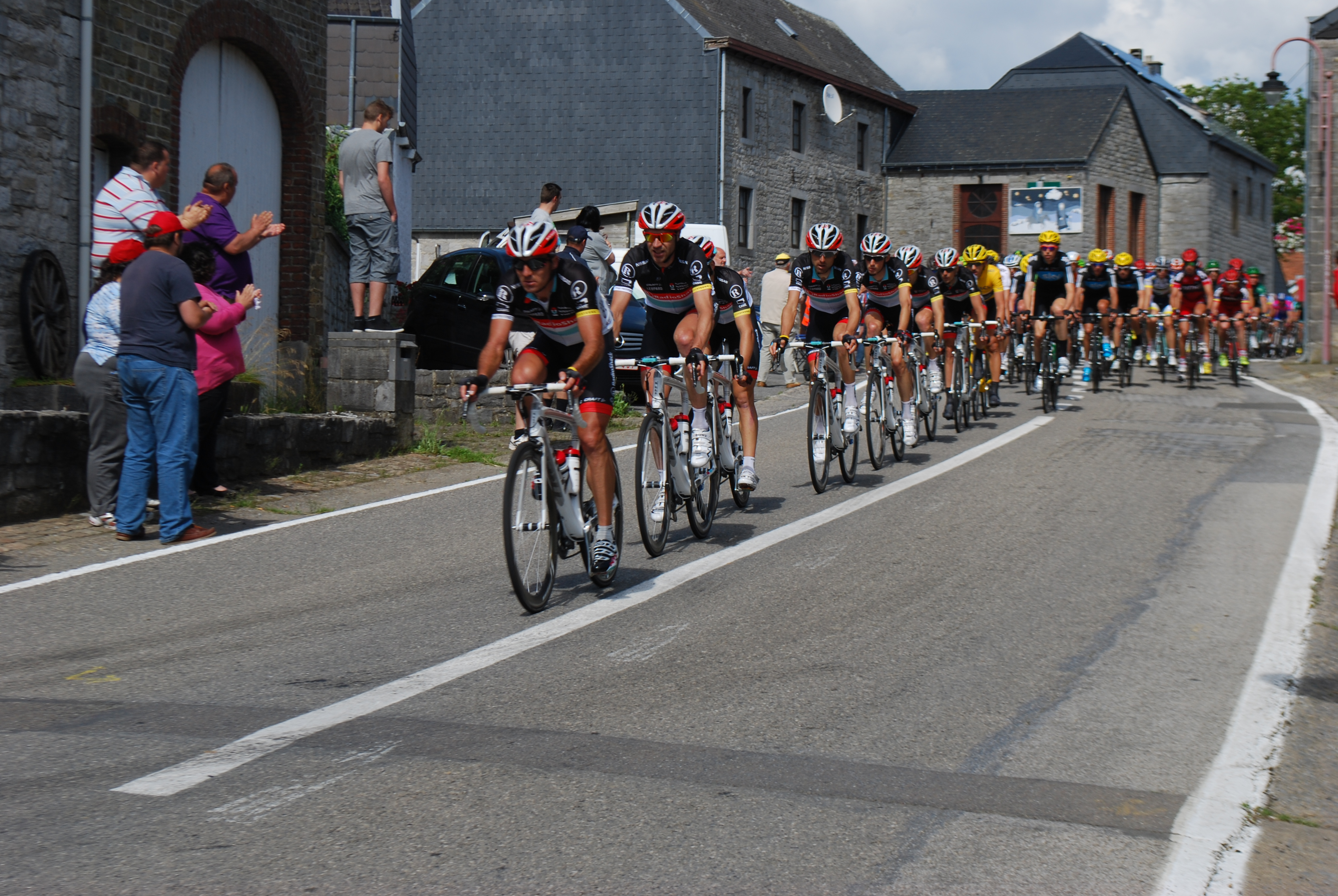 Vue du passage du peloton du Tour de France 2012 à Tohogne (Durbuy).